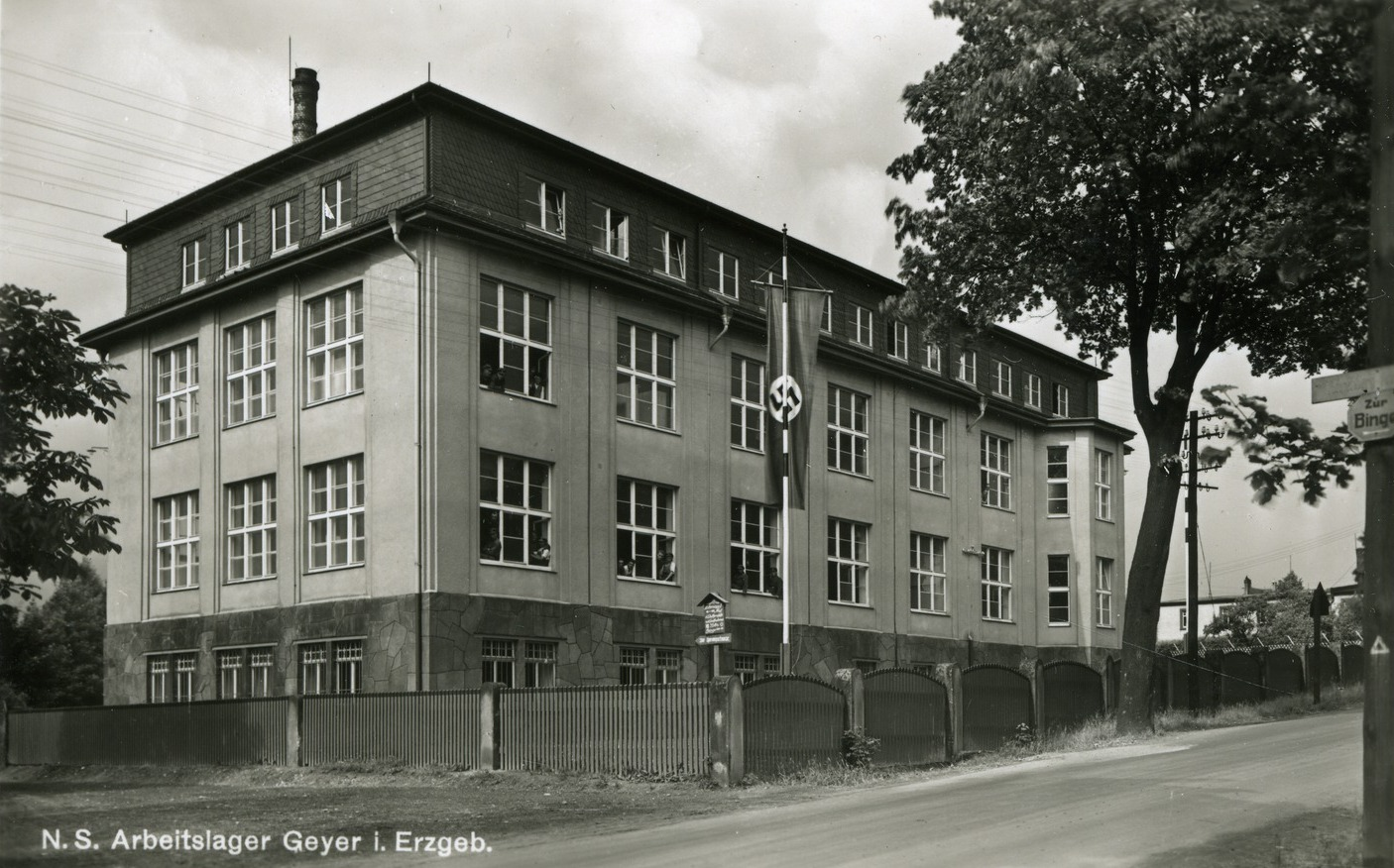 Geyer; N.S. Arbeitslager This postcard is from publisher Brück & Sohn in Meißen ( postcard has a unique number 26164 and is available in a higher resolution at the publisher. This images was uploaded in a cooperation project between Wikipedians and the publisher.